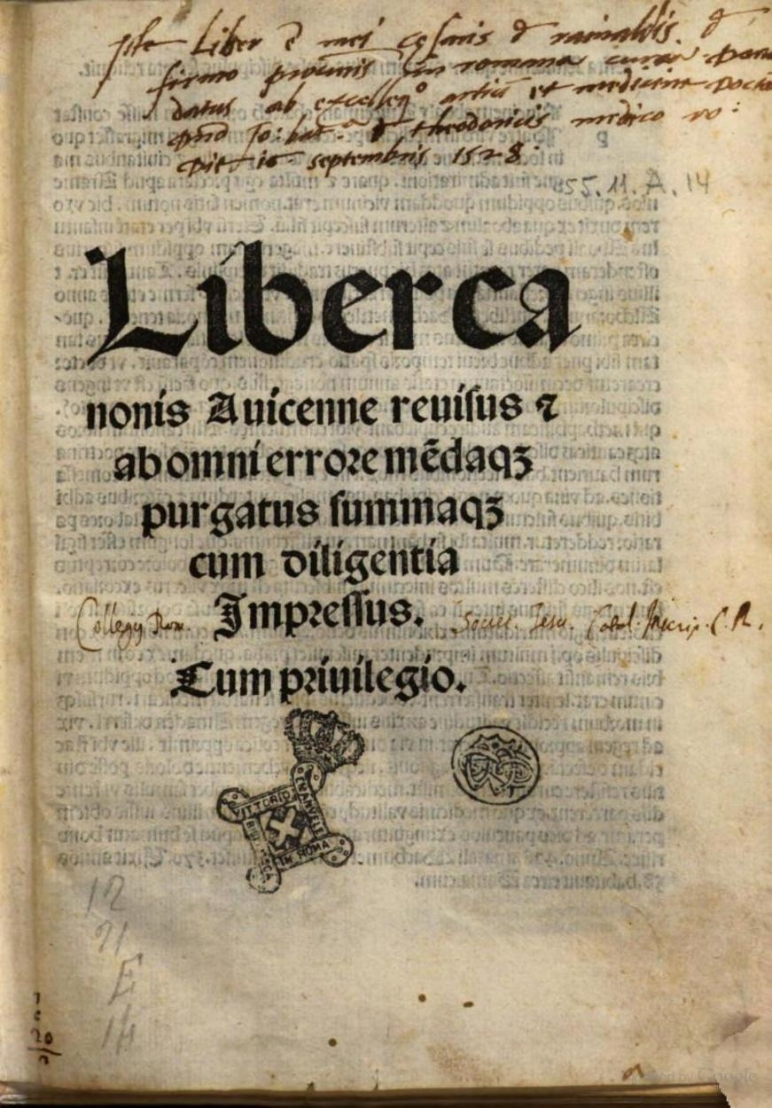 Avicenna, Canon (Venice, 1507) title page